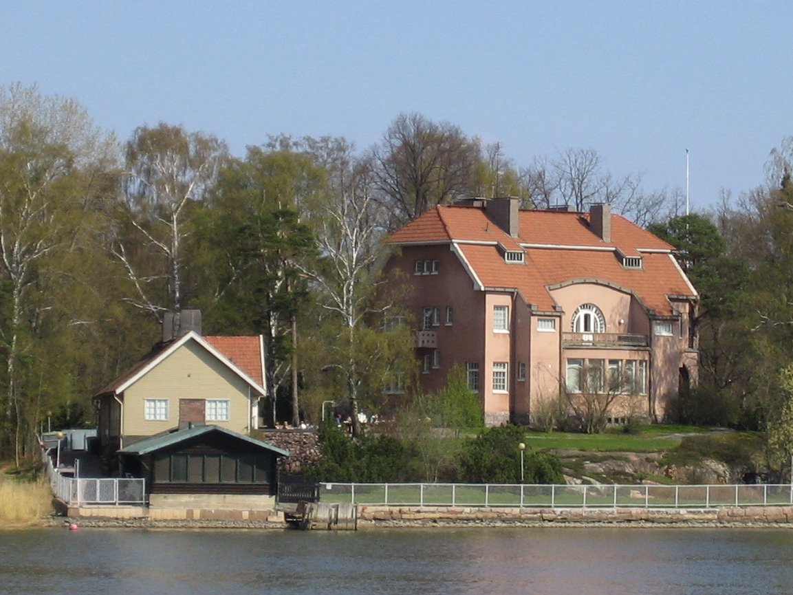 Tamminiemi, Meilahti, Helsinki